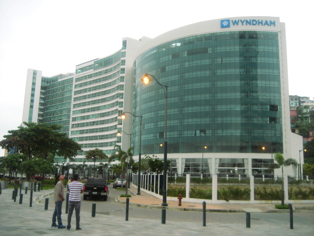 Hotel Wyndham en la ciudad de Guayaquil.